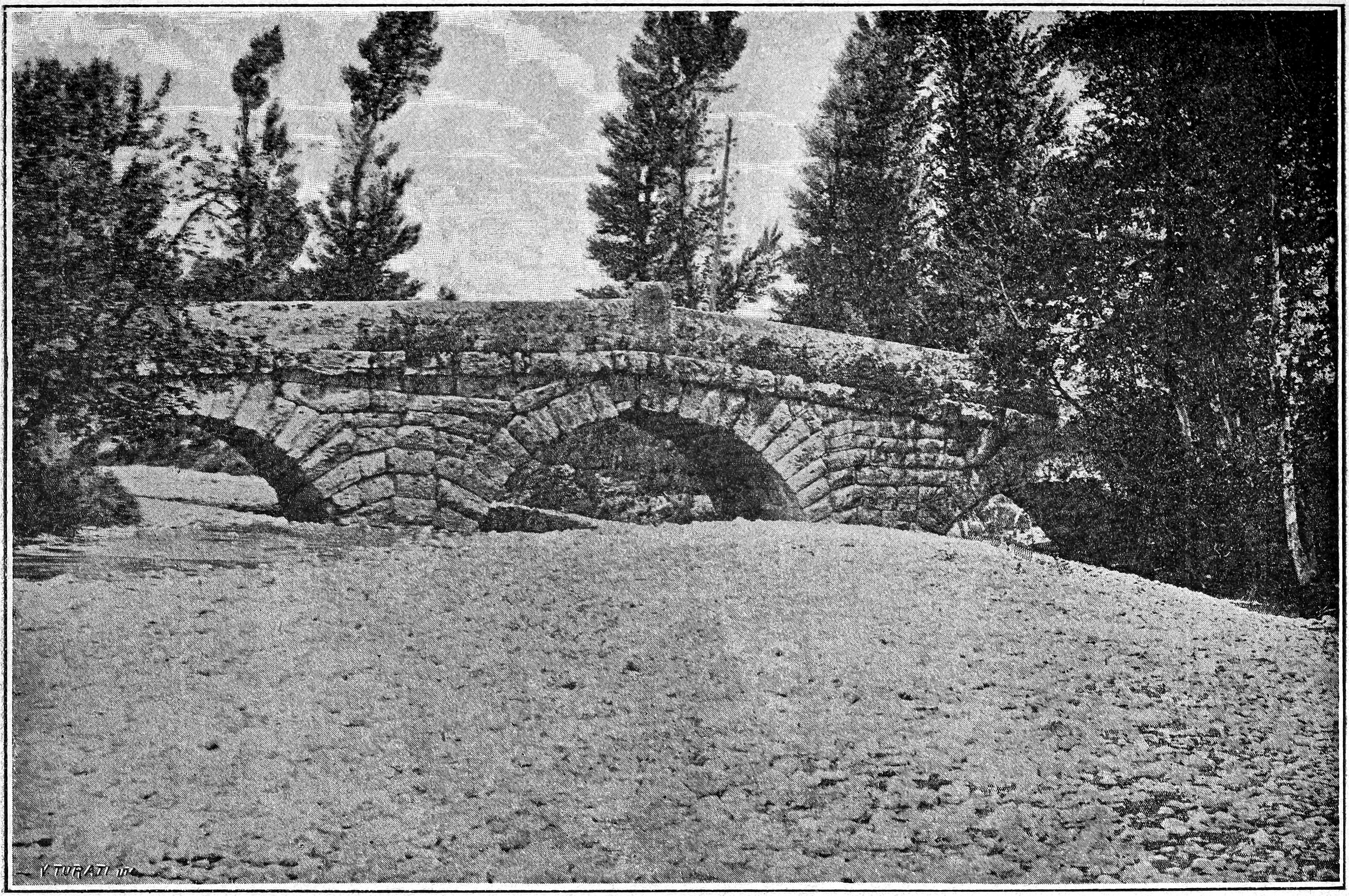 Veduta sopra corrente del Ponte Tufaro. Da I monumenti e le opere d'arte della città di Benevento: lavoro storico, artistico, critico, di Almerico Meomartini, Tipografia di L. de Martini e figlio, Benevento, 1889